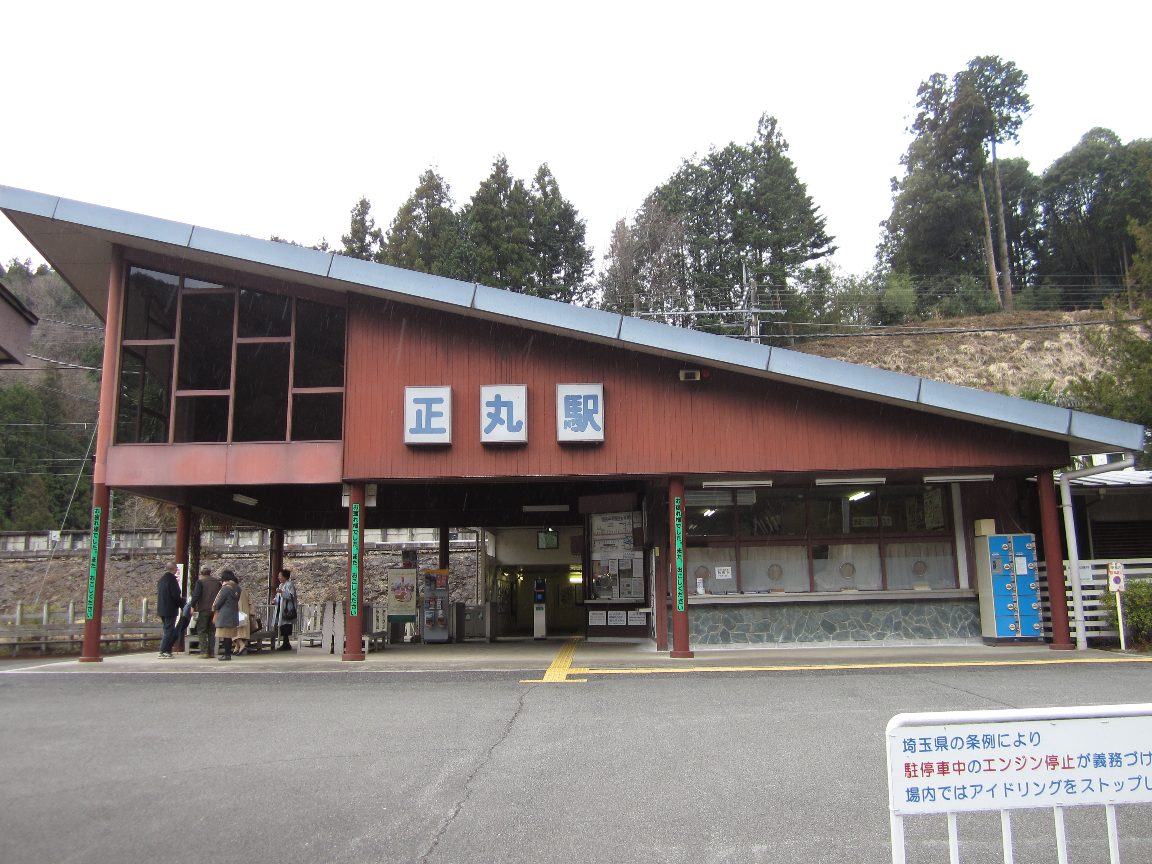 西武池袋線正丸駅舎